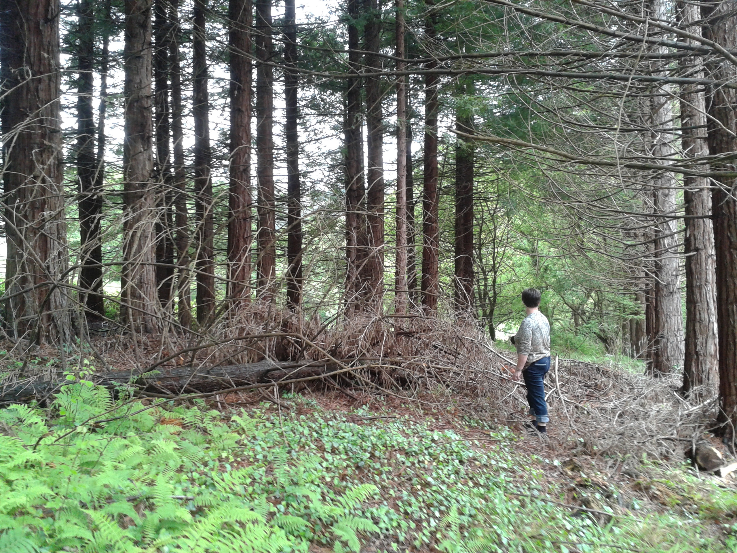 Plantación de sequoia sempervirens en Fontao, Foz. Ser humano de 1,65 metros de altura.